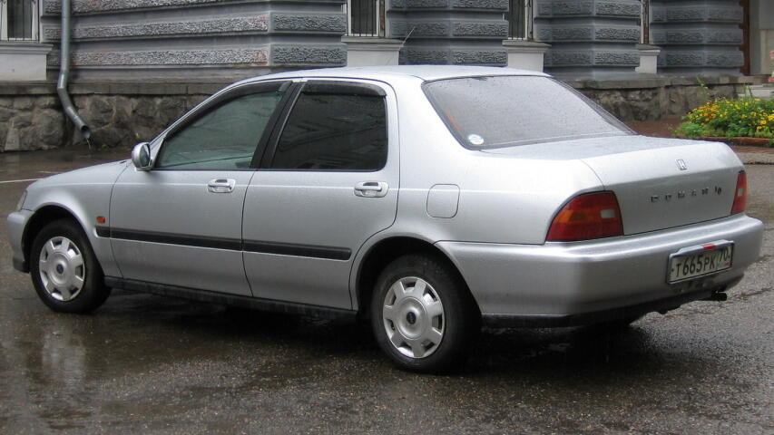 Photo taken in Tomsk, Russia